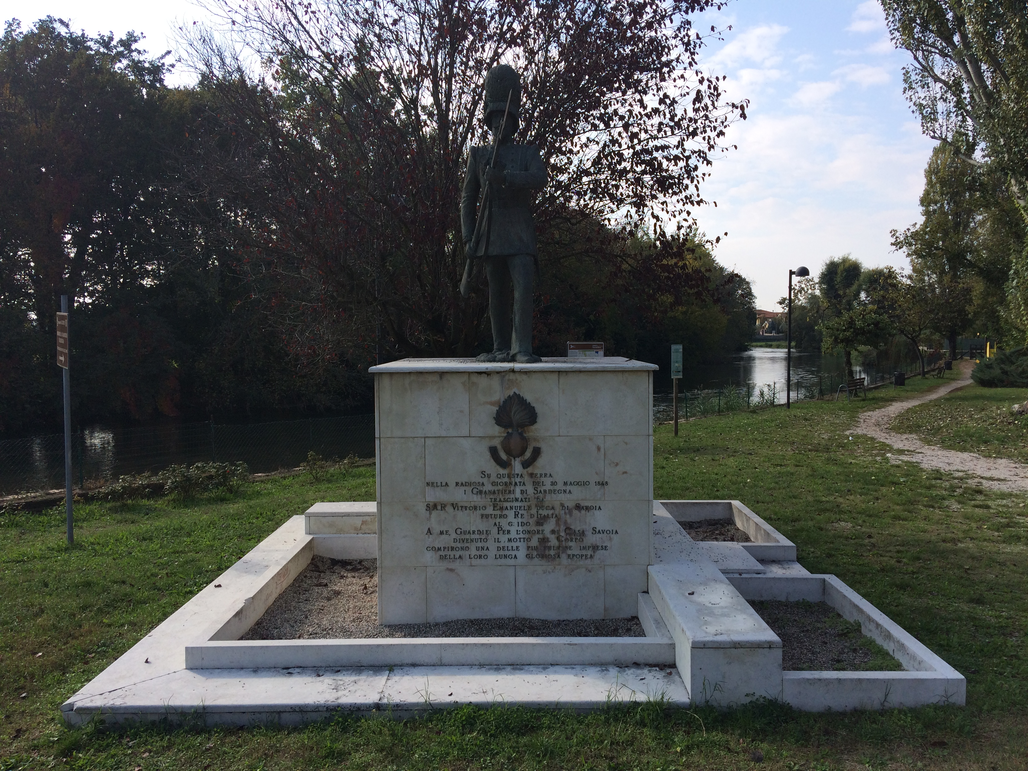 Monumento ai Granatieri di Sardegna a Goito, provincia di Mantova.